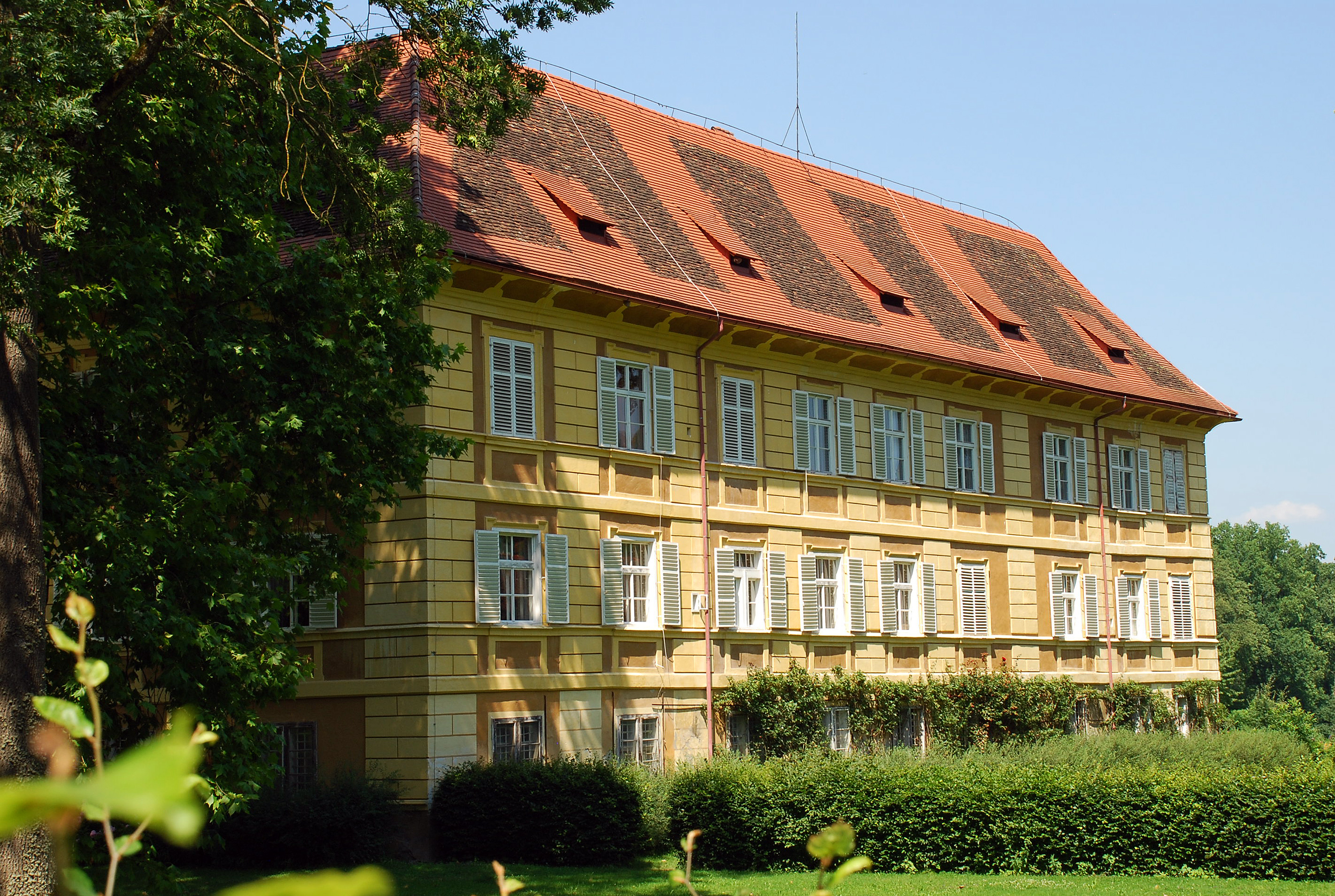 Schloss Frauental, Hörbing, Deutschlandsberg Object location46° 48′ 49.09″ N, 15° 14′ 40.04″ E